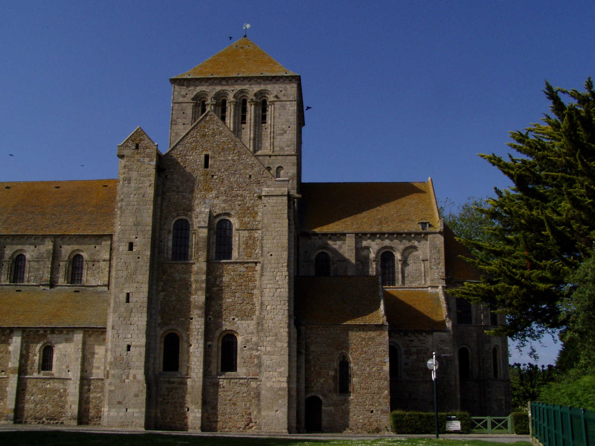 Abbaye de Lessay située dans le département de la Manche (France)